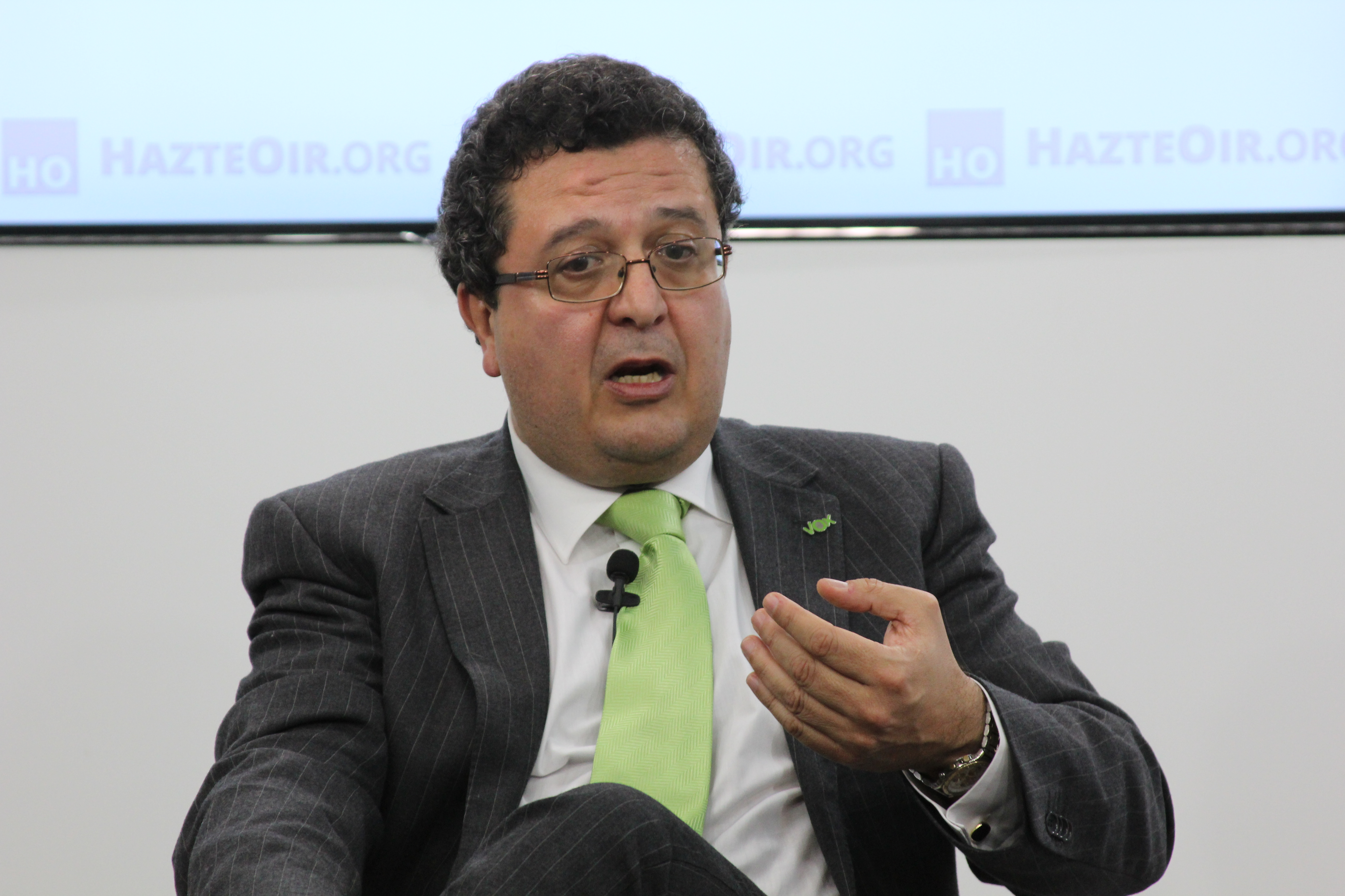 16/03/2015 Entrevista con Francisco Serrano VOX